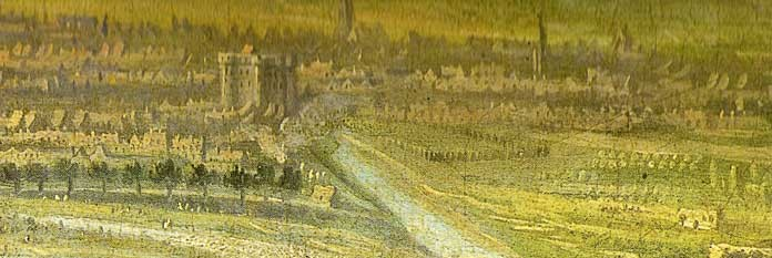 Blocus de Paris en l'année 1649, détail montrant au premier plan la Plaine d'Ivry, le faubourg Saint-Marcel et en arrière-plan, le faubourg Saint-Anthoine et la Bastille.